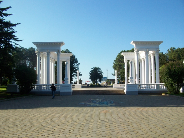 Батумский приморский парк, бульвар